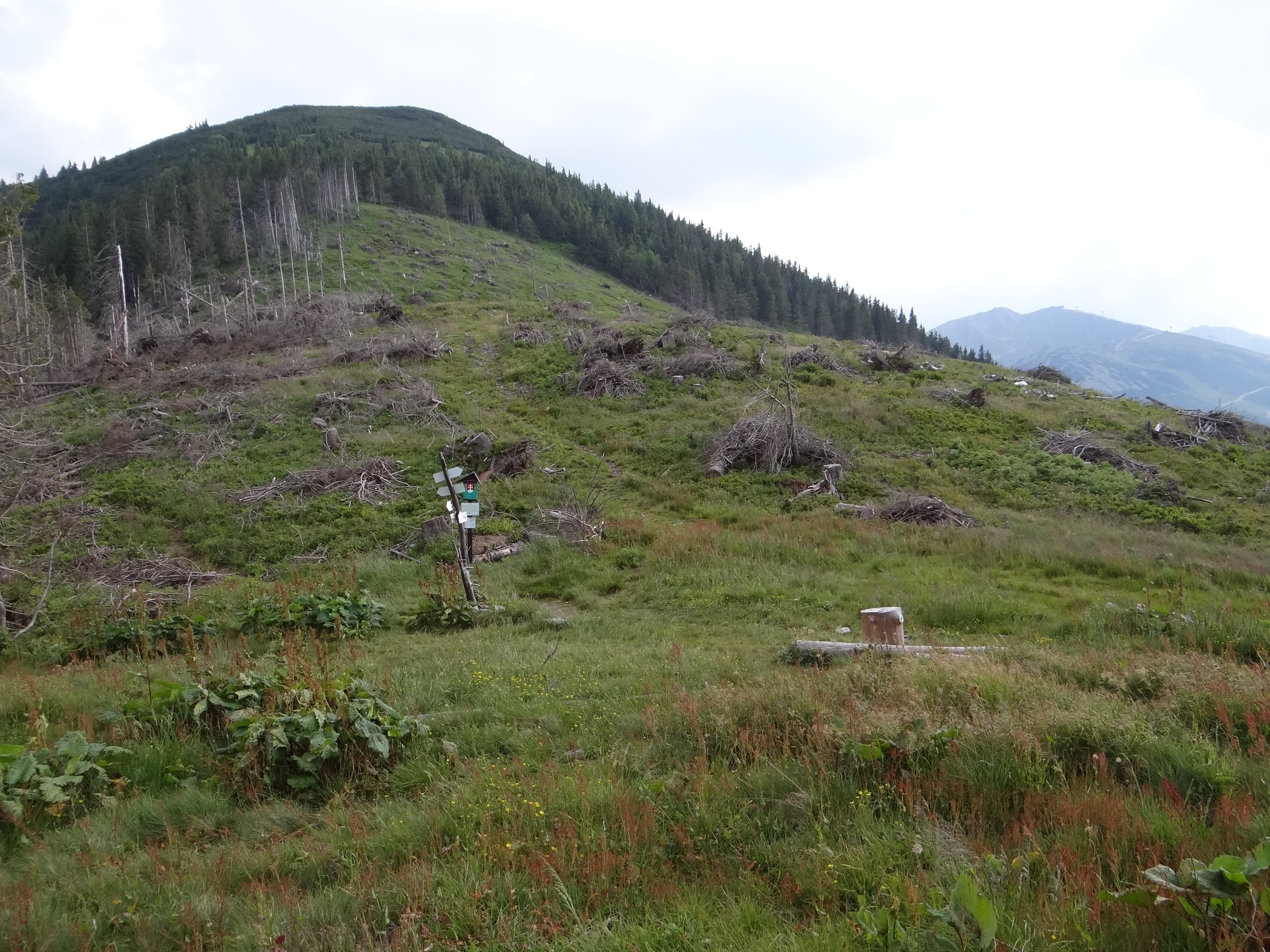 Sedlo Javorie, Tanečnica